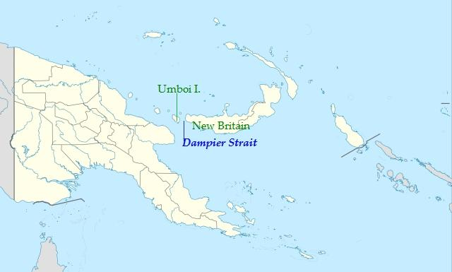 Localisation du Détroit de Dampier